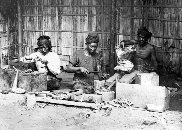 Negatief. Goud- en zilversmeden vond men vaak op plaatsen waar zich een vorstelijk hof bevond of bevonden had. Dat is ook een logische ontwikkeling. Alleen vorstelijke hoven en hun entourage waren in staat zoveel vraag te genereren dat daarmee een bedrijfstak als die van goud- en zilversmeden in stand kon worden gehouden. Nu had Atjeh niet alleen eeuwenlang zijn eigen sultanshof gehad, maar ook zijn eigen goudmijnen. Daardoor was de vraag naar het eindproduct en aanbod van de grondstof gegarandeerd. De goudsmid in het midden op de foto zou een Klingalees (orang Keling) kunnen zijn, destijds de gangbare term voor iemand uit Zuid-India. (P. Boomgaard, 2001). Goudsmeden aan het werk in goudsmidwinkel, Atjeh